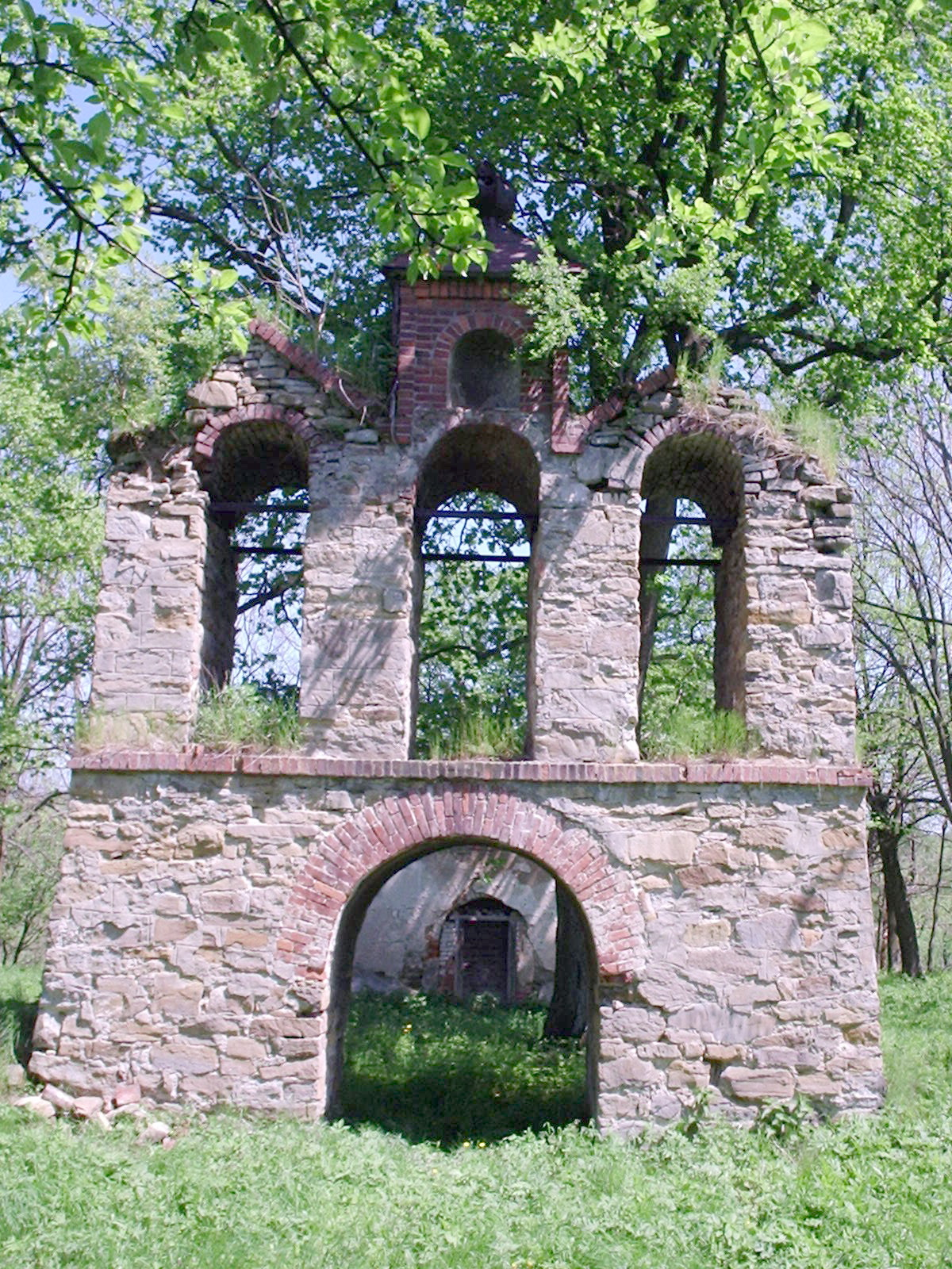 Ruiny dawnej cerkwi greckokatolickiej (dzwonnica parawanowa) w Płonnej (województwo podkarpackie)